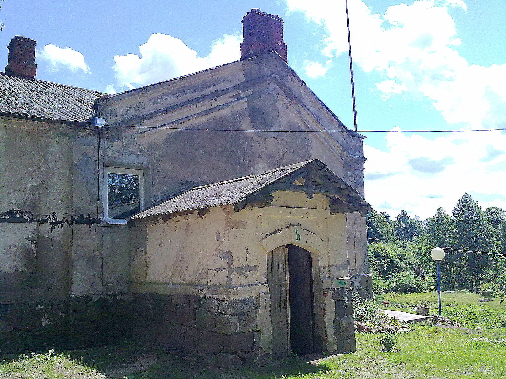 Палац у Опсе, флігель